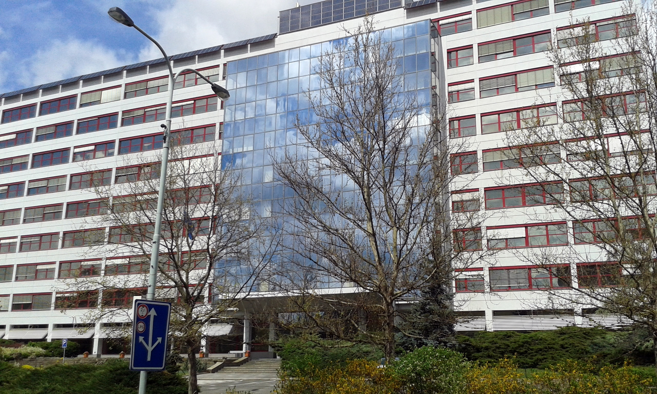 Ministerstvo životního prostředí, Praha